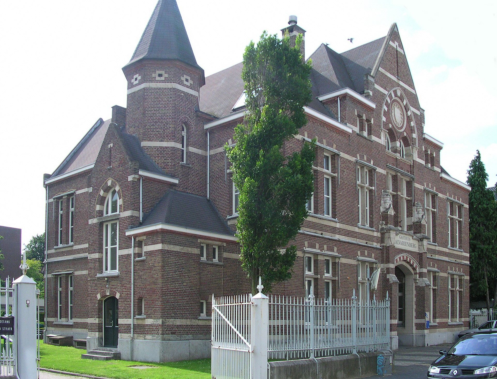 Maastricht, früheres St.-Elisabethtehuis (Abtstraat 2b), ~ 1891 durch Bilsmeyer & Van Riel aus Antwerpen im Neorenaissancestil entworfenes Gebäude, dessen Name Bezug nimmt auf das dahinter liegende ehemalige (1628 - 1796) Nonnenkloster „Calvarienberg“. Heute beherbergt es Ämter der Stadtverwaltung.